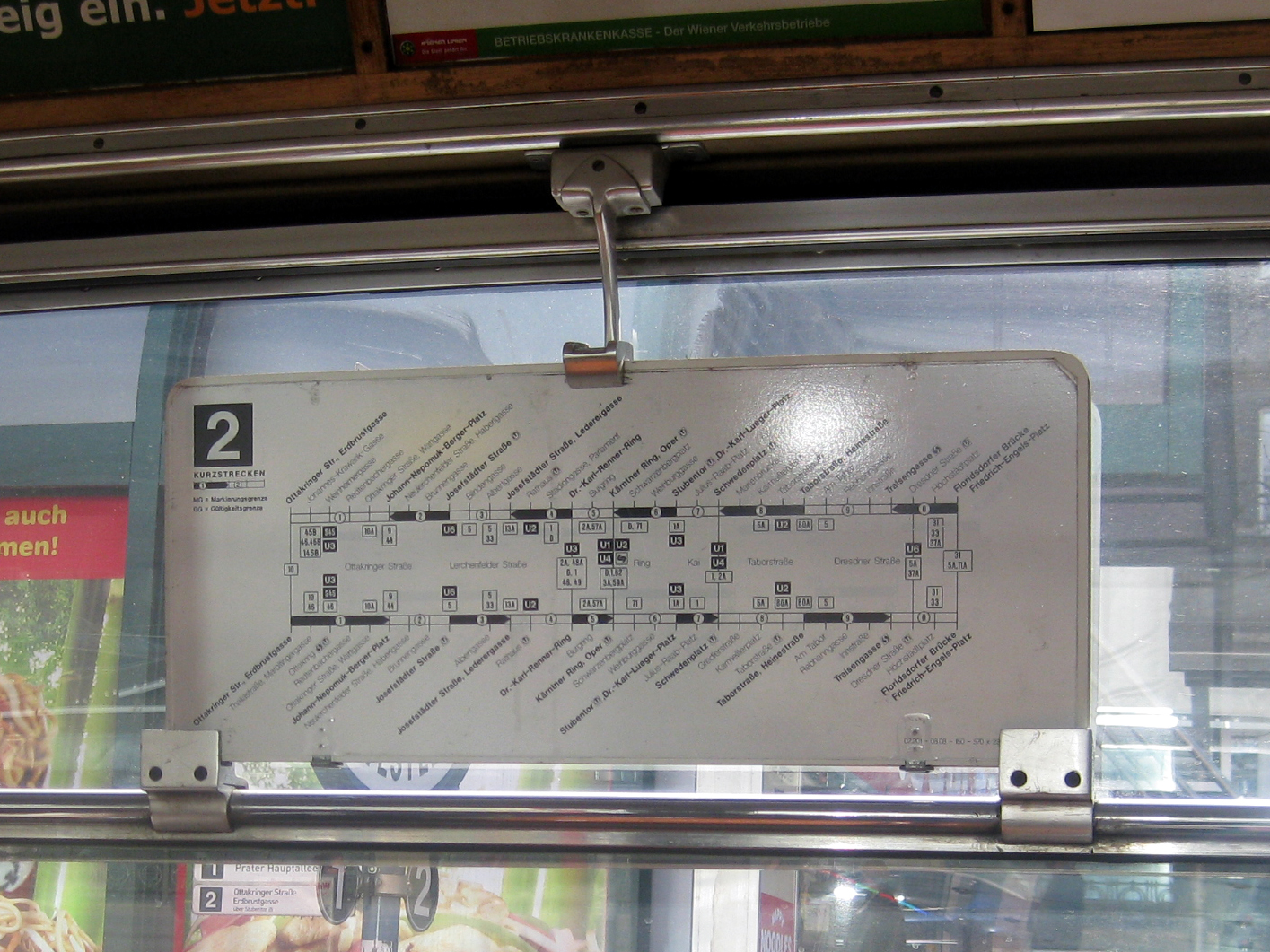 Infotafel, Straßenbahnline 2, Wien